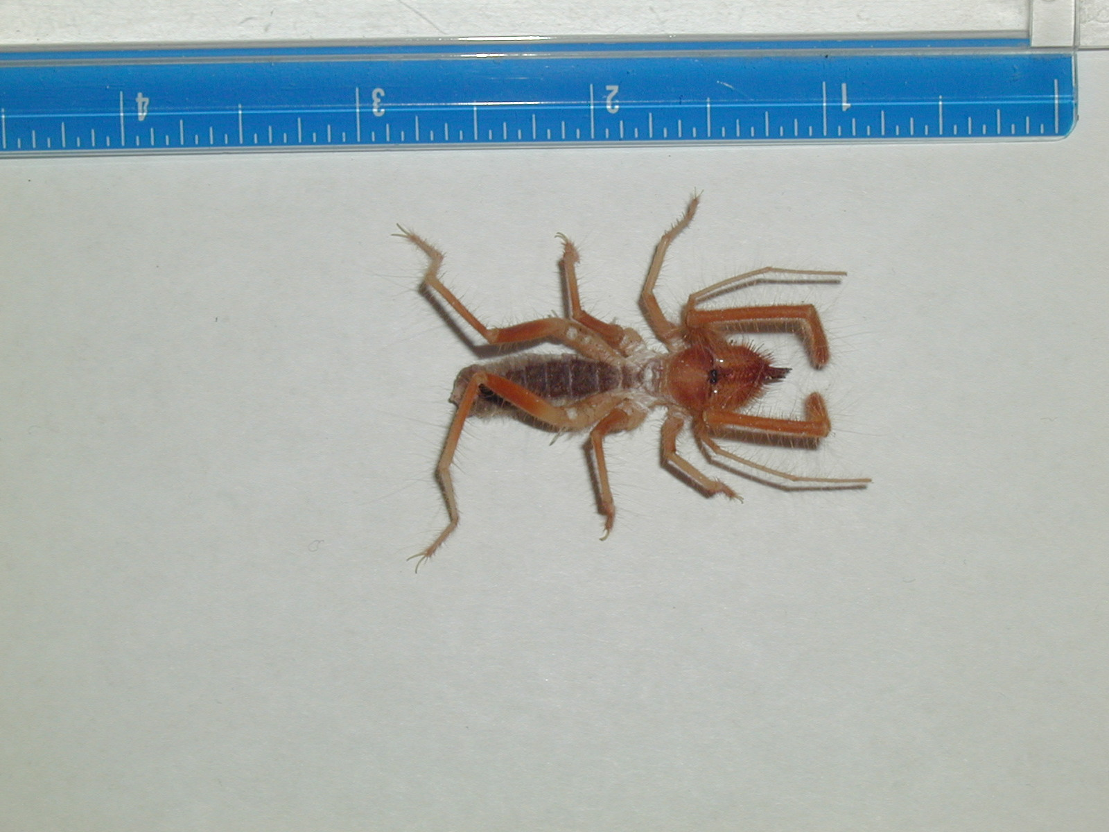 Solifugid captured in Phoenix Arizona against inch scale ruler.